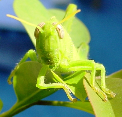 Anacridium aegyptium (juvenile stage)Subphylum: Hexapoda Ordo: Orthoptera Subordo: Caelifera Familia: Acrididae